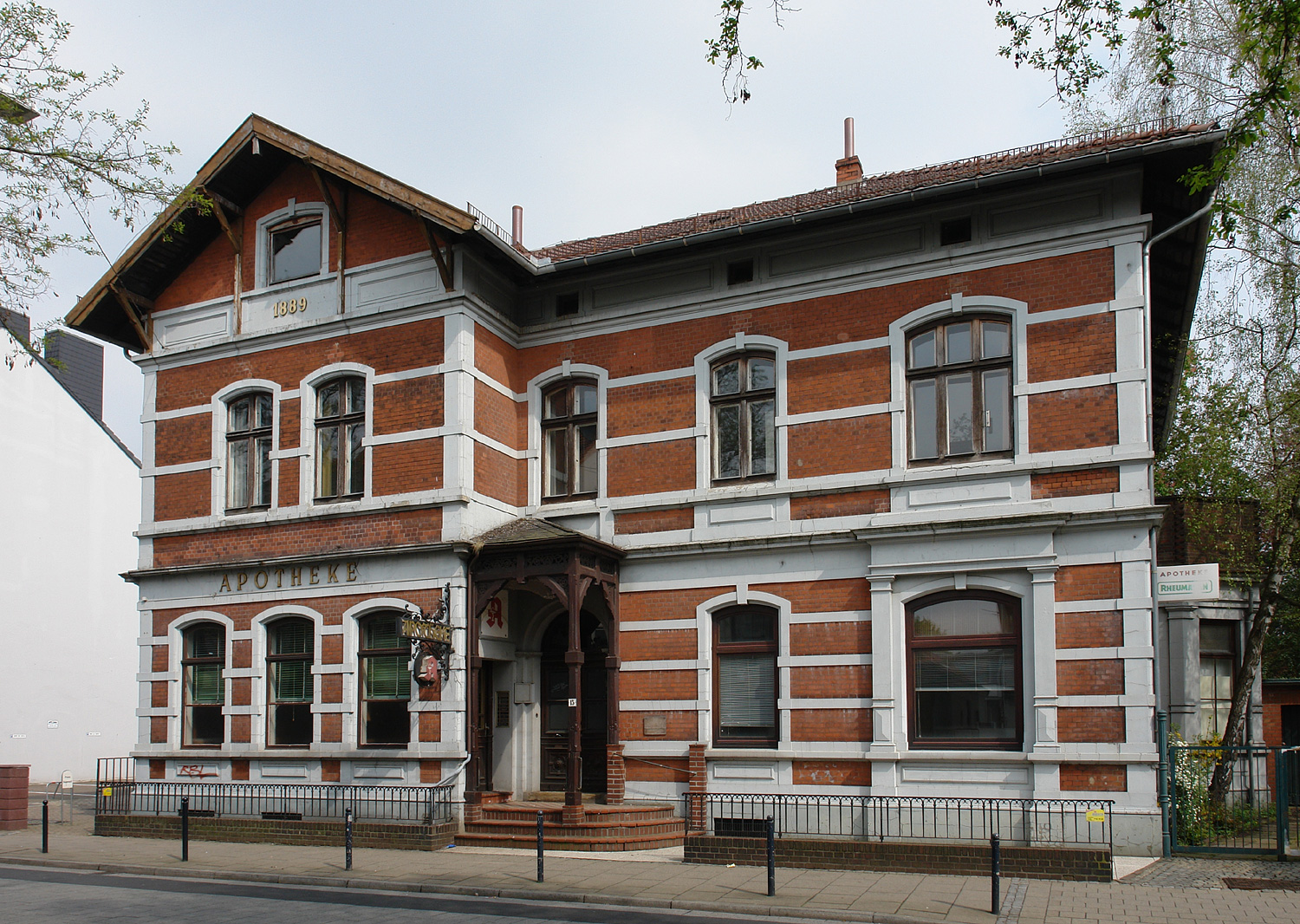 Alte Apotheke in Bremen-Hemelingen von 1889 (Hemelinger Bahnhofstraße 15), Umbau 1945-1947 von Reinhard Ahlemann. Das abgebildete Objekt ist ein geschütztes Kulturdenkmal in der Freien Hansestadt Bremen, mit der Nr. 0485 beim Landesamt für Denkmalpflege registriert.